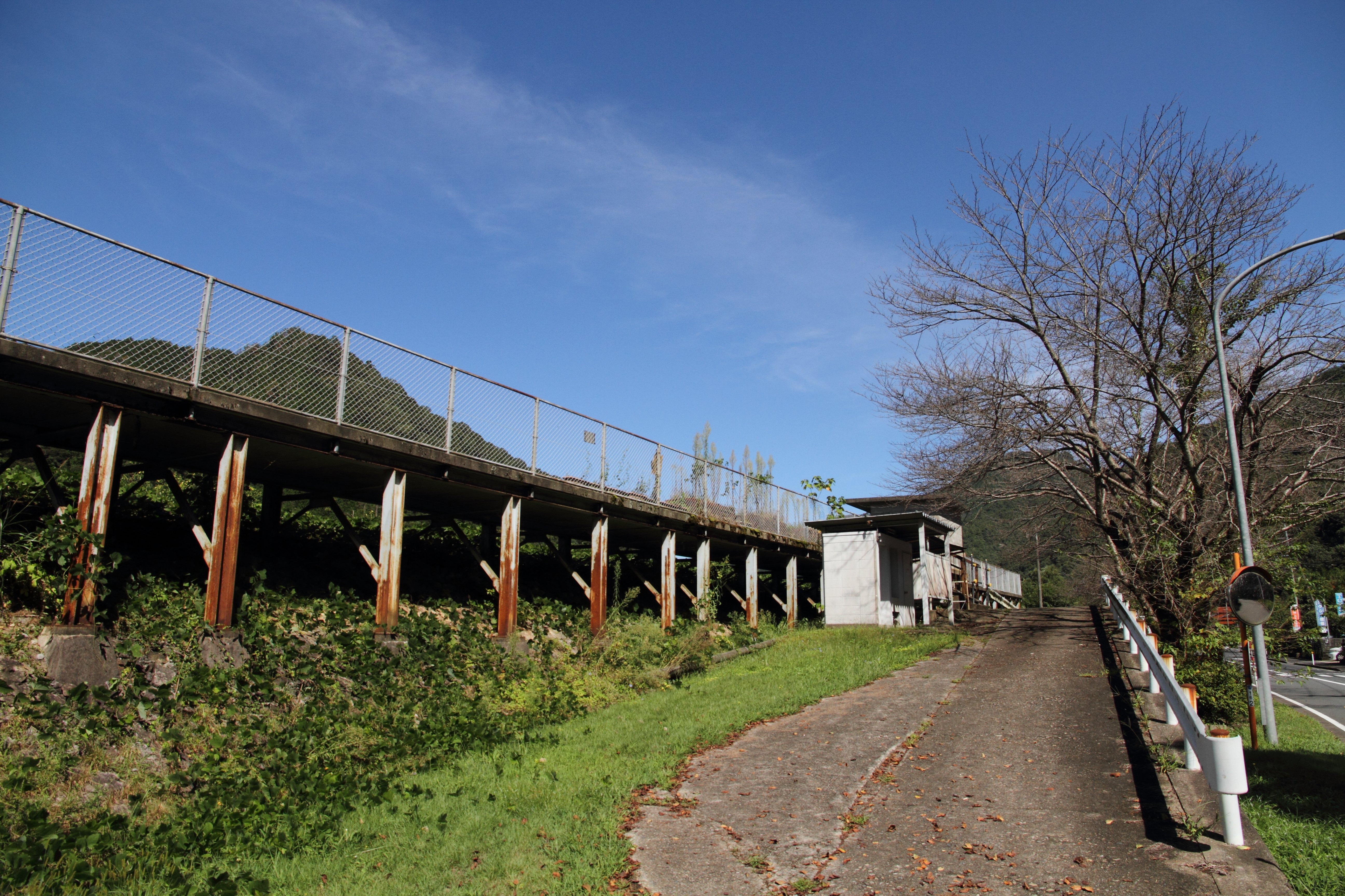 西日本旅客鉄道 旧三江線 潮駅 駅全景。